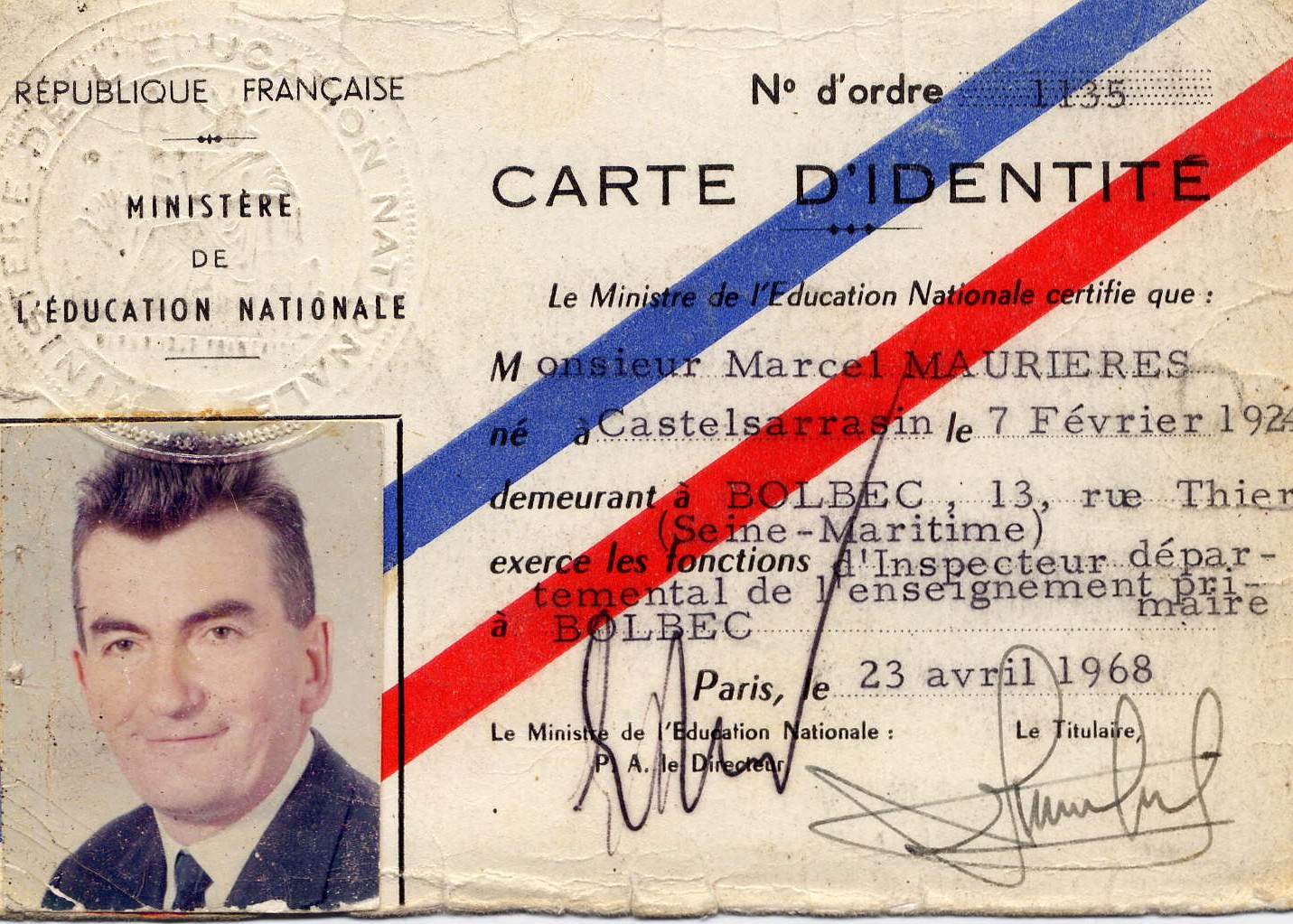 Varte d'identite d'Inspecteur Départemental de l'Education Nationale